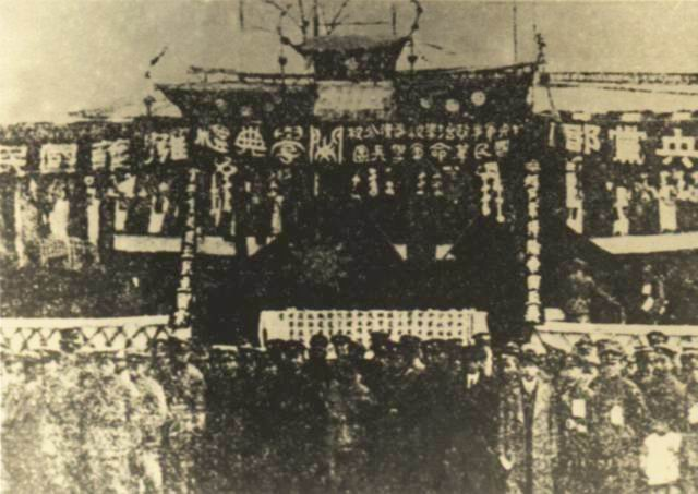 武汉中央军事政治学校开学盛况